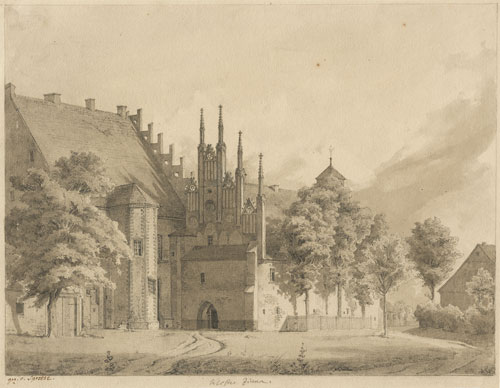 Ansicht von Kloster Zinna, links Westfassade der Neuen Abtei (15. Jh.) mit vorspringendem Treppenturm, rechts Nordfassade des Siechen- und Gästehauses (14. Jh.) (pencil drawing, 22 x 28,3 cm)